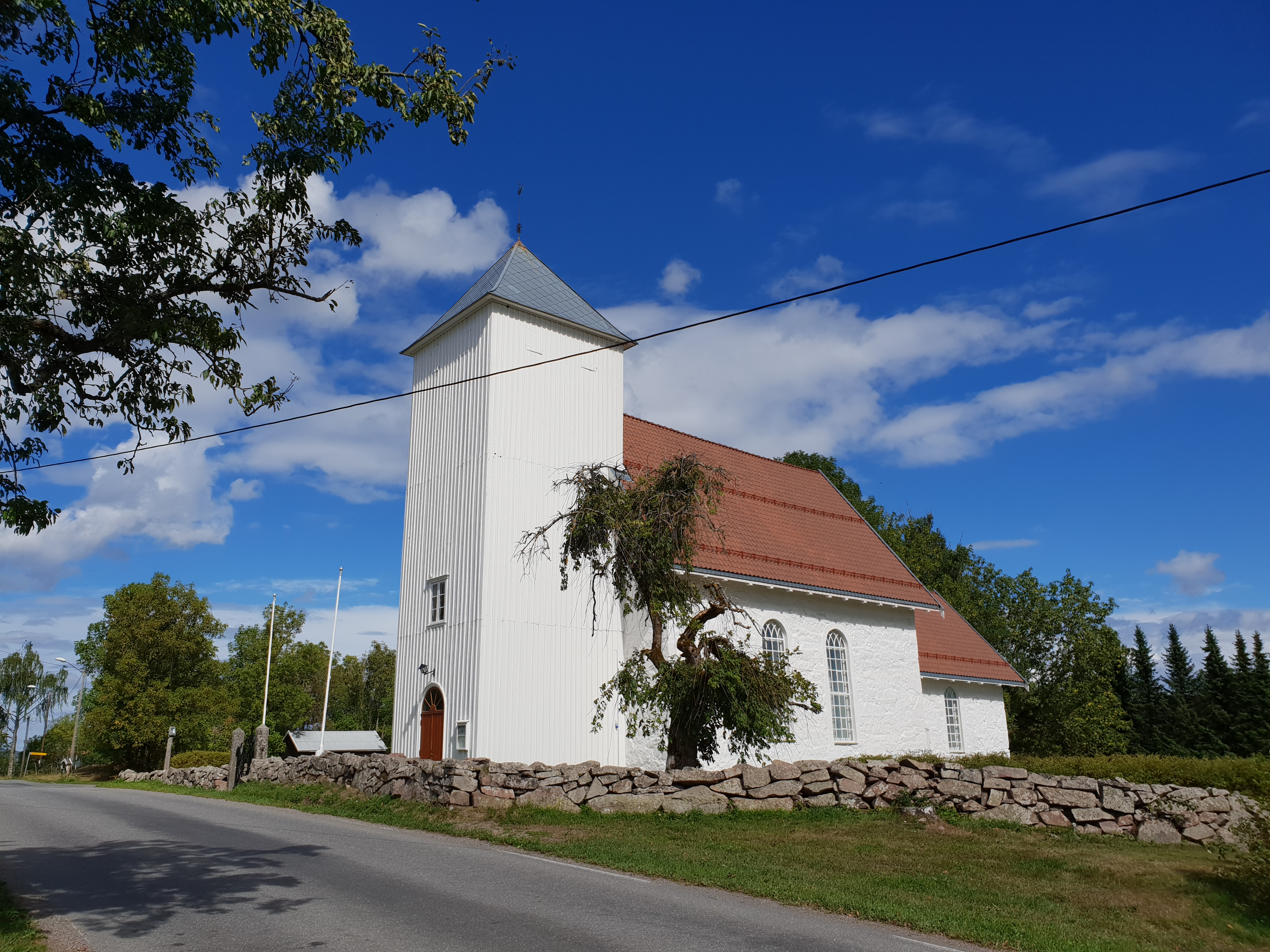 Fon kirke i Re